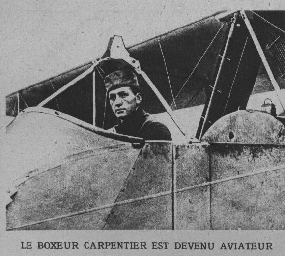 Le boxeur Georges Carpentier aviateur pendant la Première guerre mondiale.